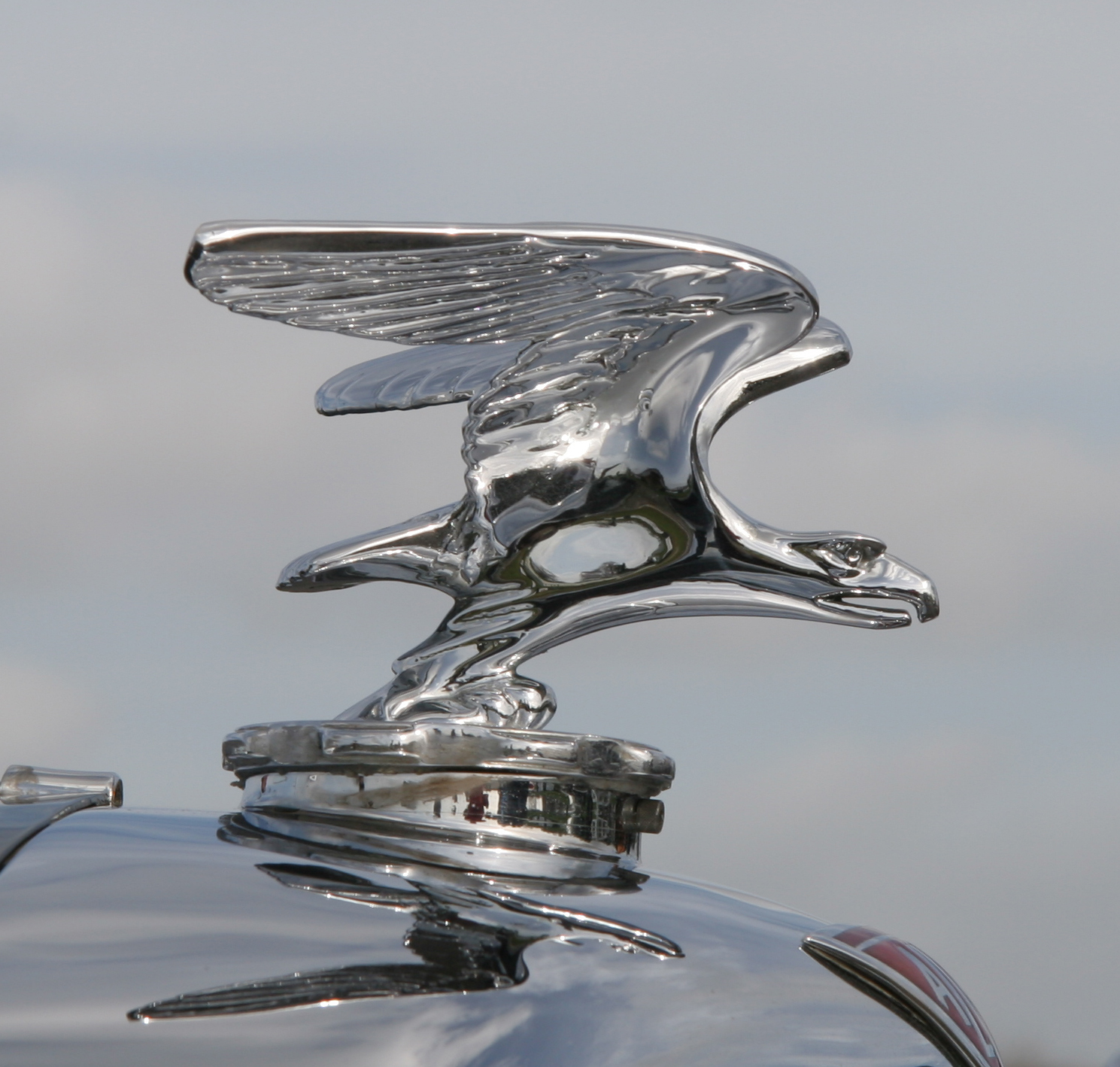 Alvis motif